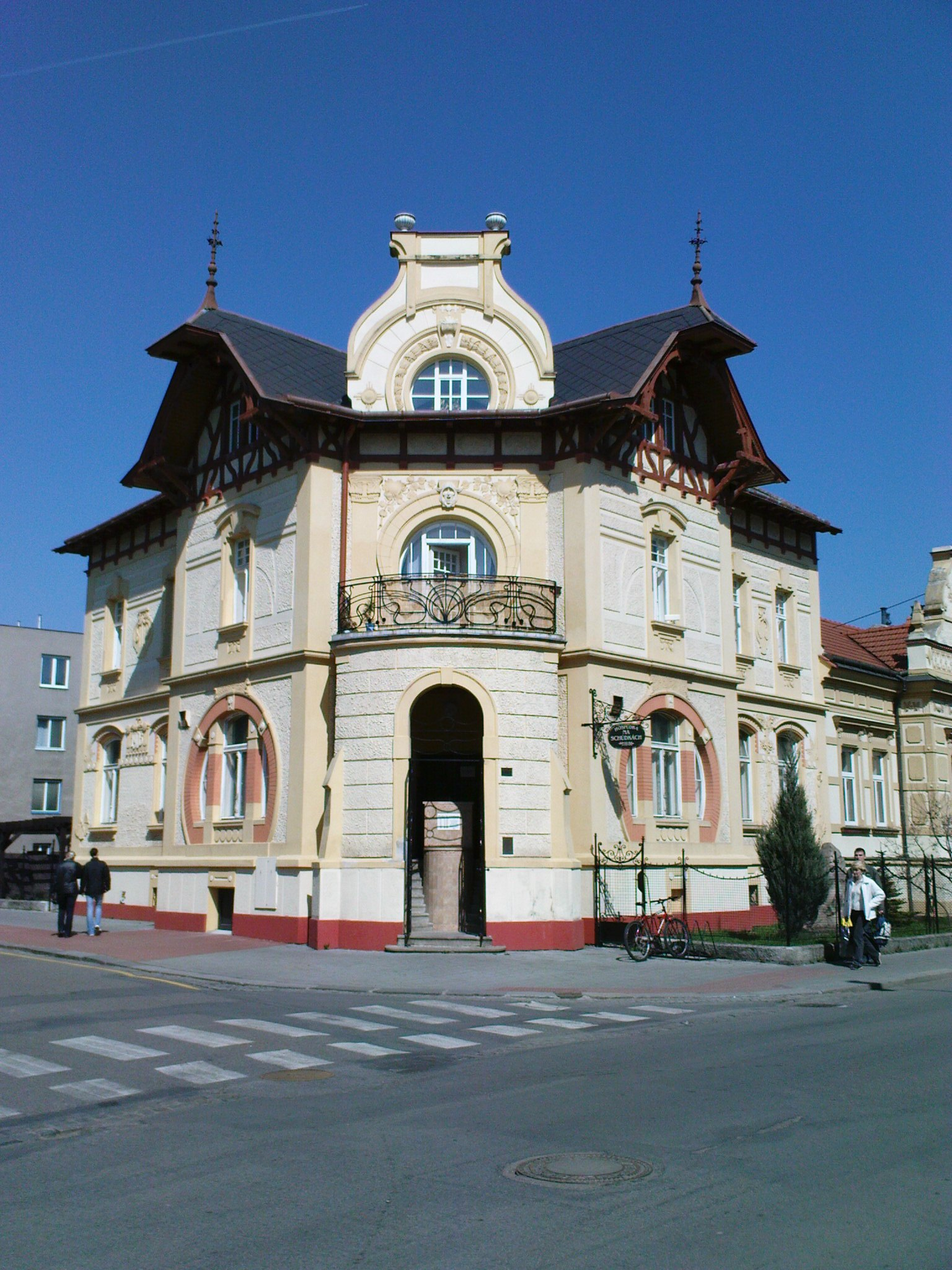 Hospůdka Na Schůdkách, Kroměříž (ukázka u nás poměrně vzácné tzv. belgické secese, 1905)